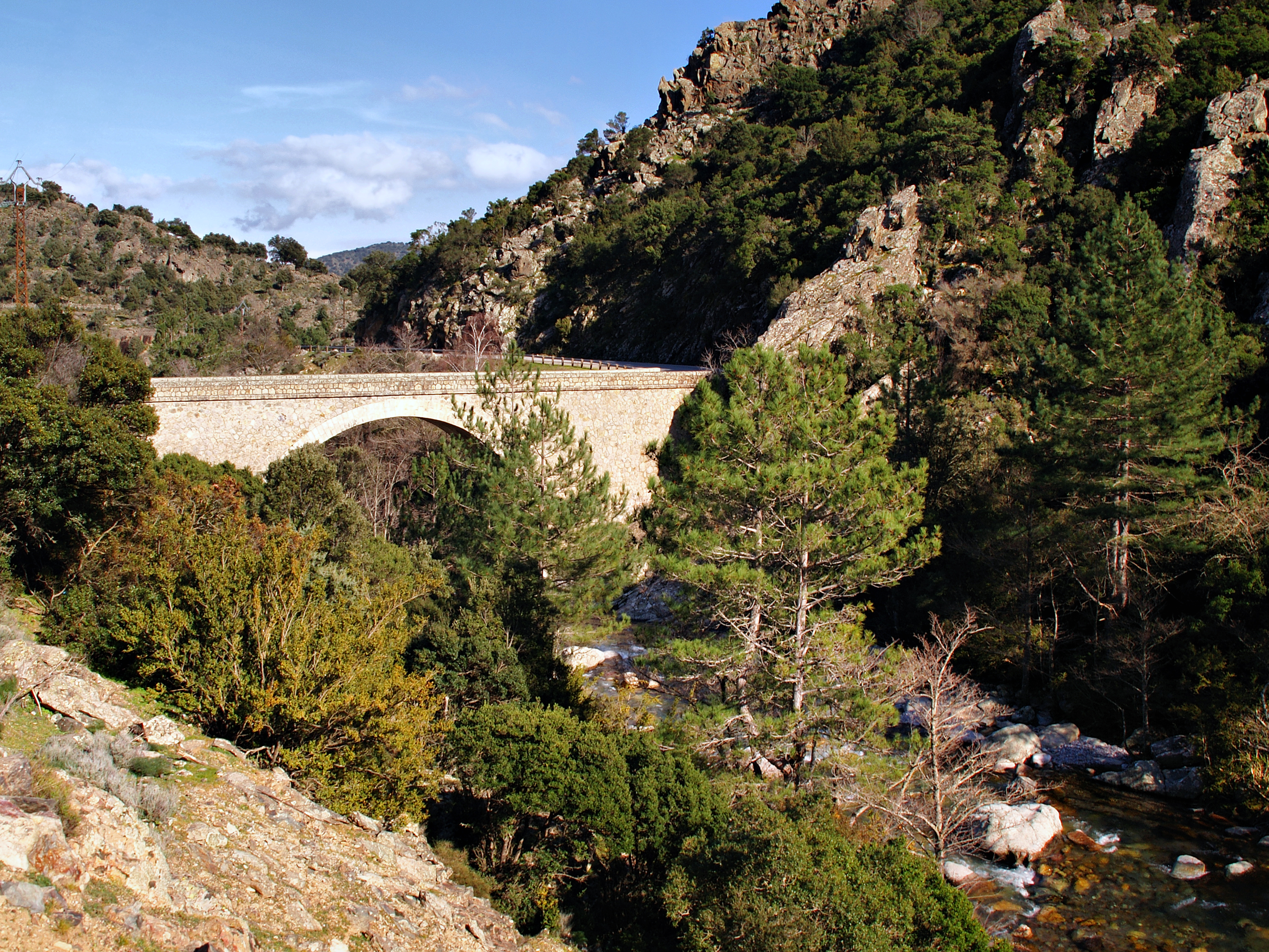 Moltifao (Corse) - Pont de Mulindina sur l'Asco (altitude 326 m)